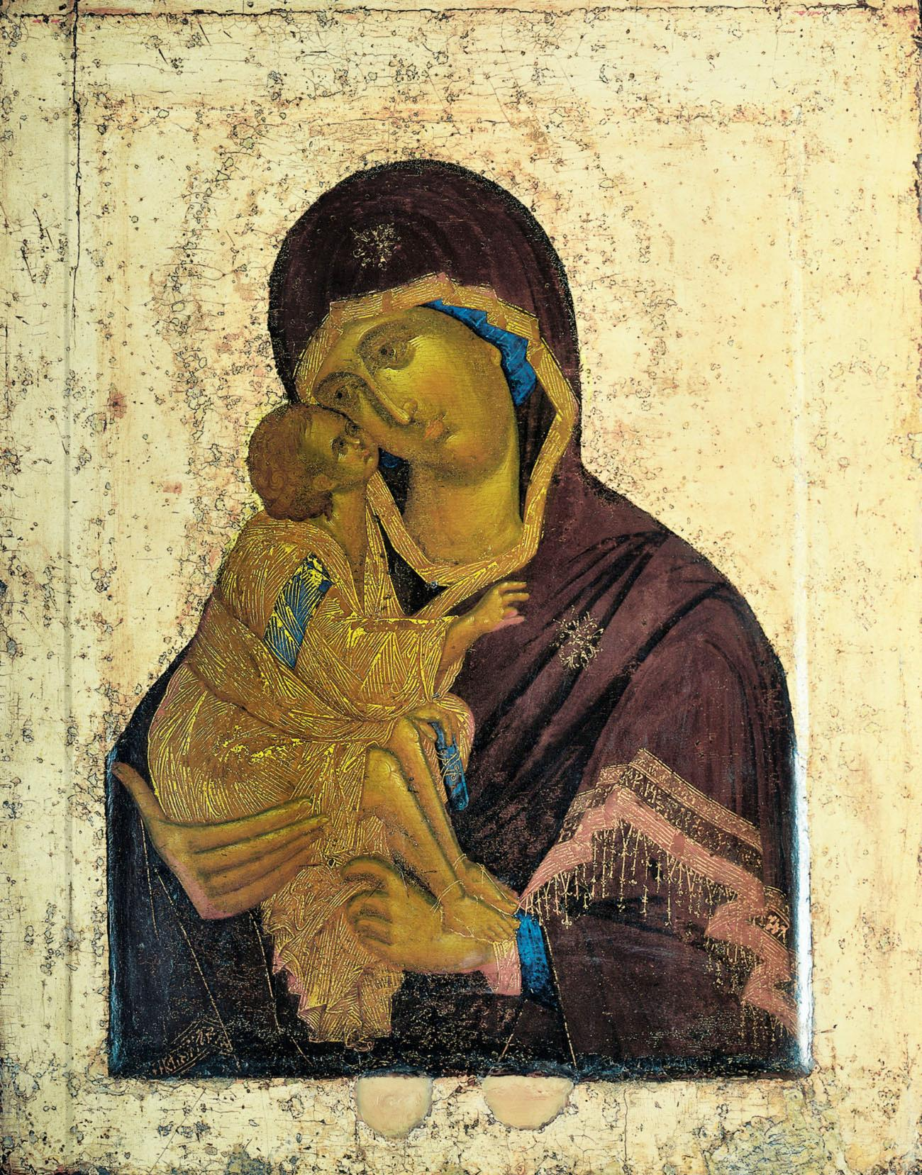 Богоматерь Донская